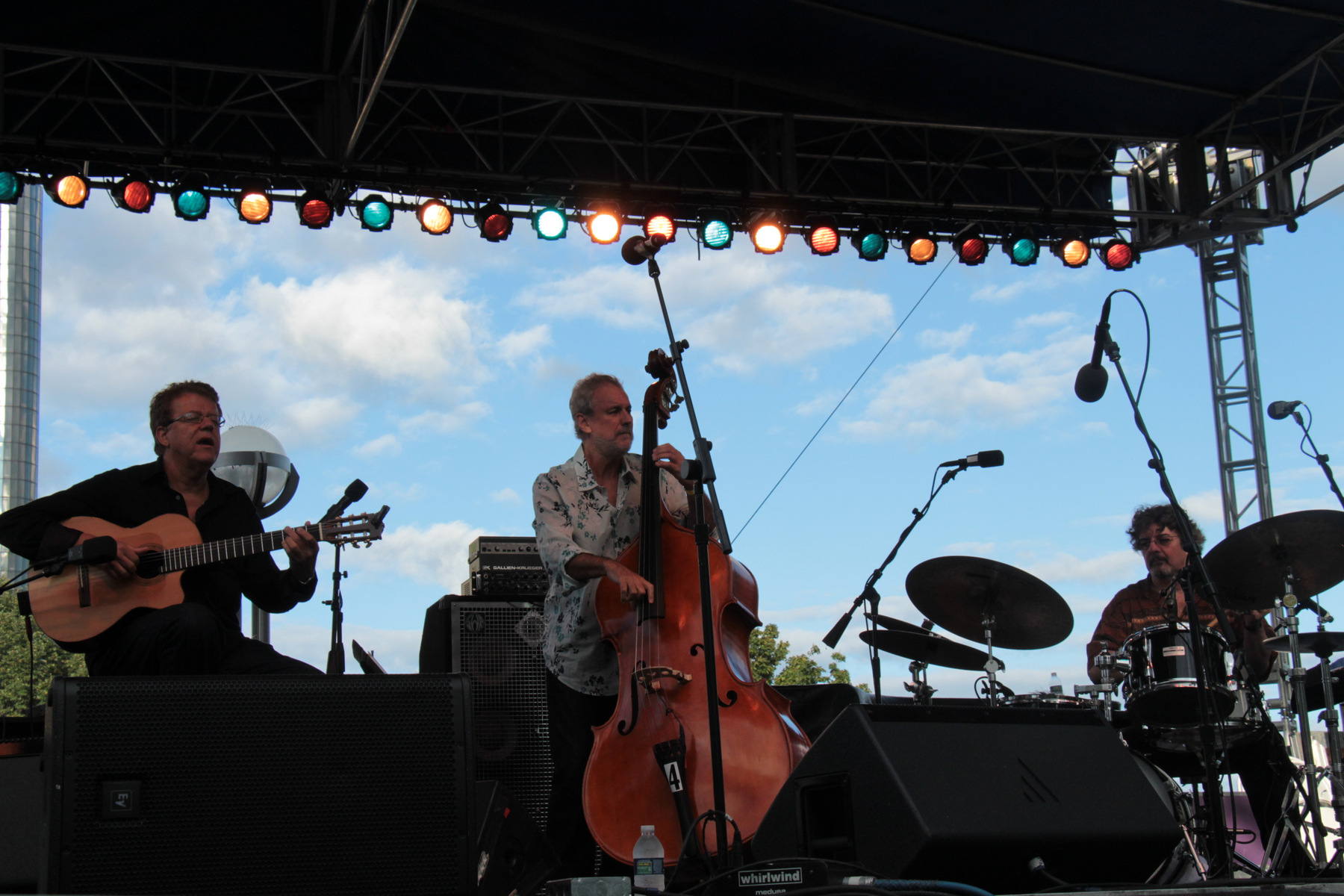 Trio Da Paz: Romero Lubambo - Guitar, Nilson Matta - bass, Duduka Da Fonseca - Drums